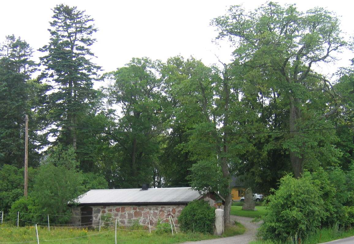 farm